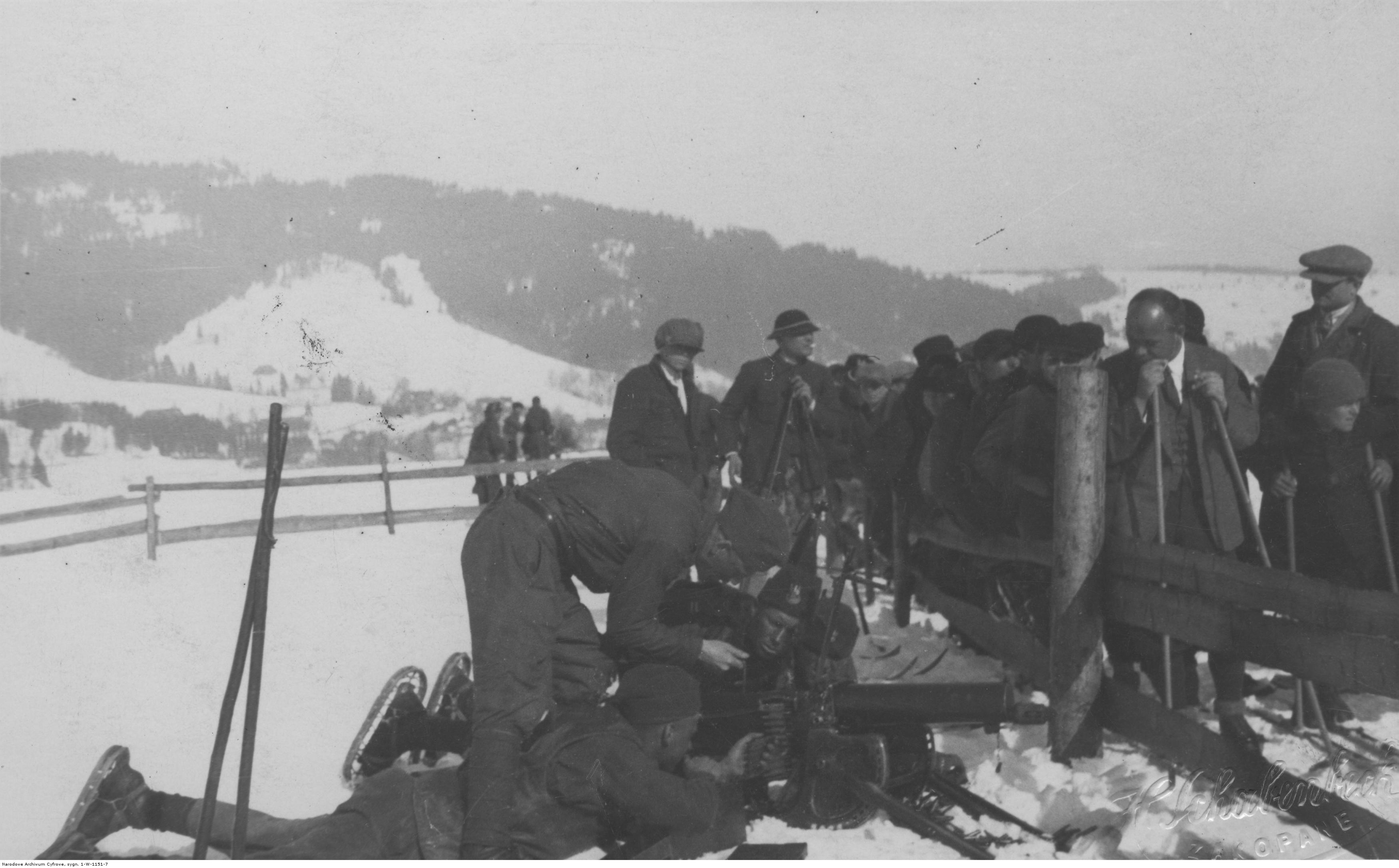 Szkoła wysokogórska przy 21 Dywizji Piechoty Górskiej w Zakopanem; luty 1928. Żołnierze przy 7,92 mm ciężkim karabinie maszynowym Maxim wz. 08. Koncern Ilustrowany Kurier Codzienny - Archiwum Ilustracji. Sygnatura: 1-W-1151-7